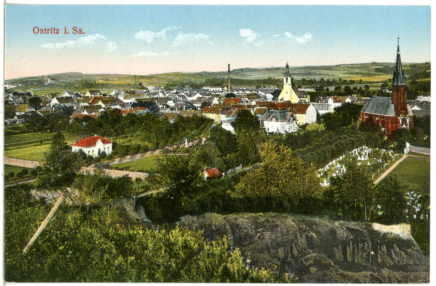 Ostritz; Blick auf den Ort This postcard is from publisher Brück & Sohn in Meißen ( postcard has a unique number 22214 and is available in a higher resolution at the publisher. This images was uploaded in a cooperation project between Wikipedians and the publisher.